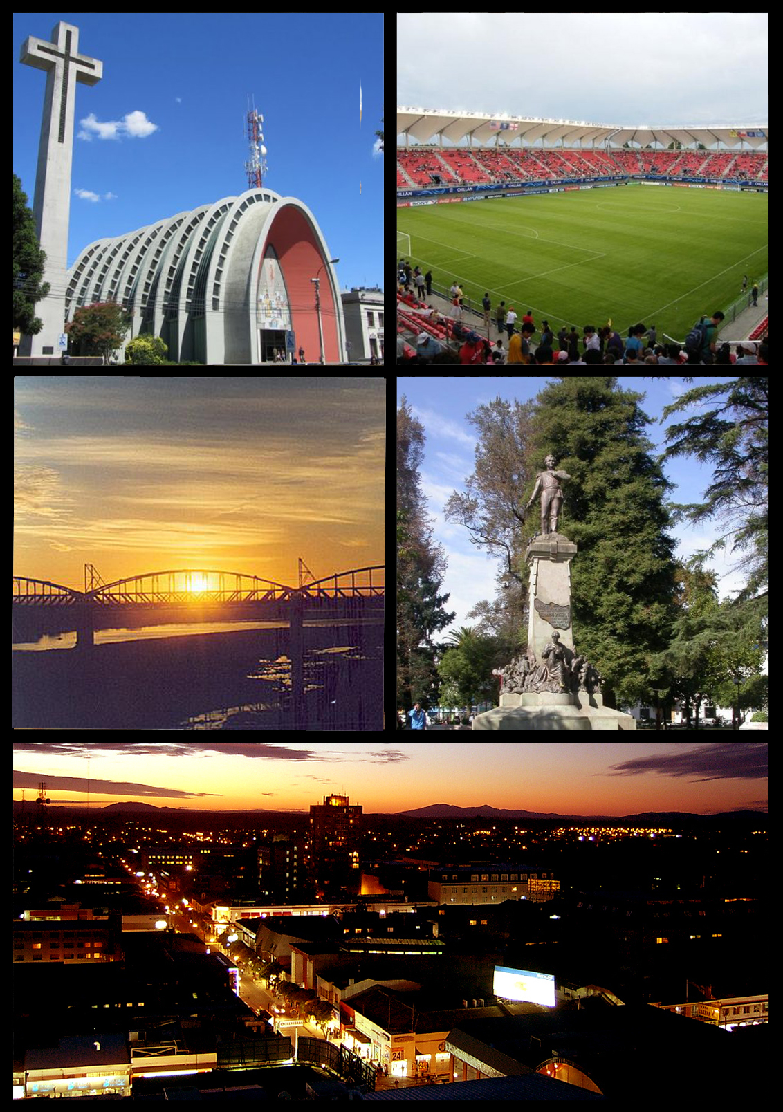 Collage de Chillán, Región del Biobío, Chile.